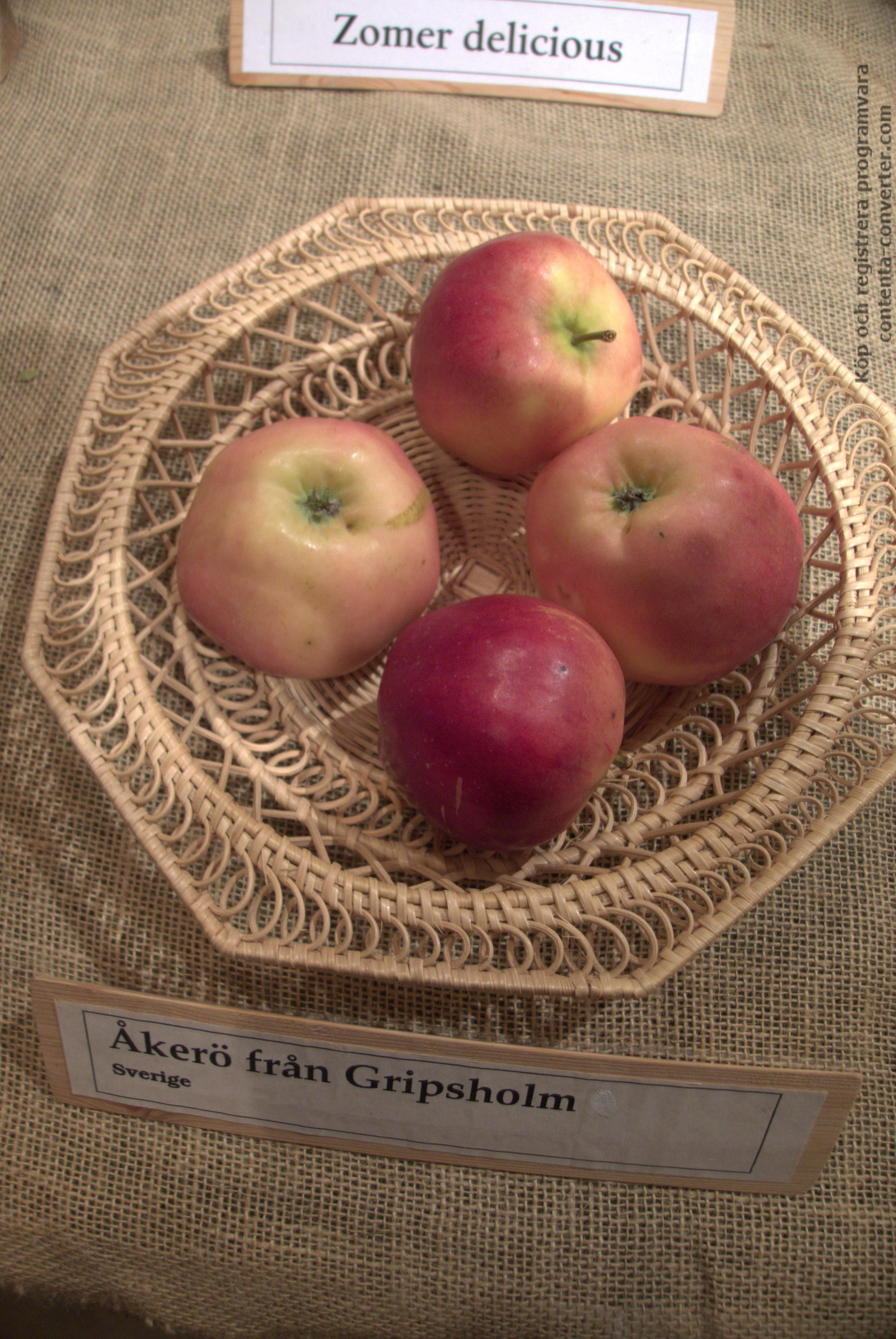 Äpplen av sorten Åkerö, från Gripsholm